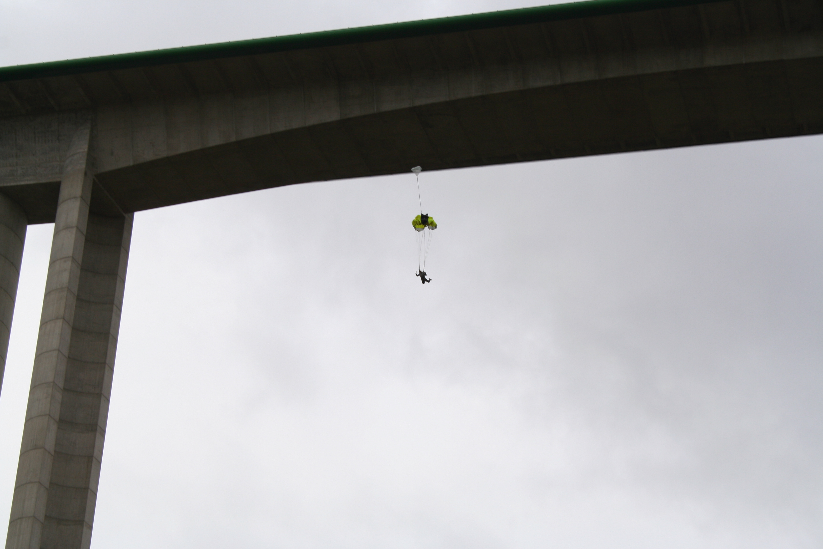 Saut en Base Jump depuis un Viaduc. 90 mètres de hauteur, ouverture immédiate. Source Photographie prise en février 2006 sous un viaduc autoroutier français. Je suis l'auteur et j'ai l'accord du parachutiste.